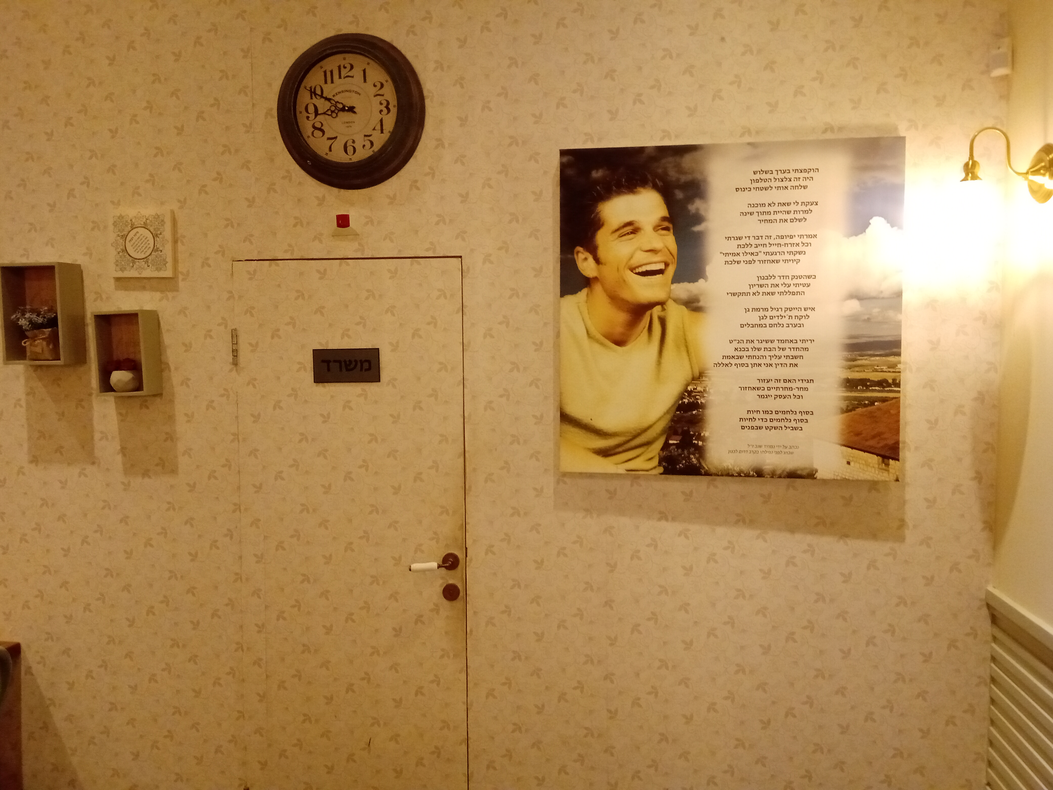 פינת הנצחה לנמרוד שגב בסניף הרשת